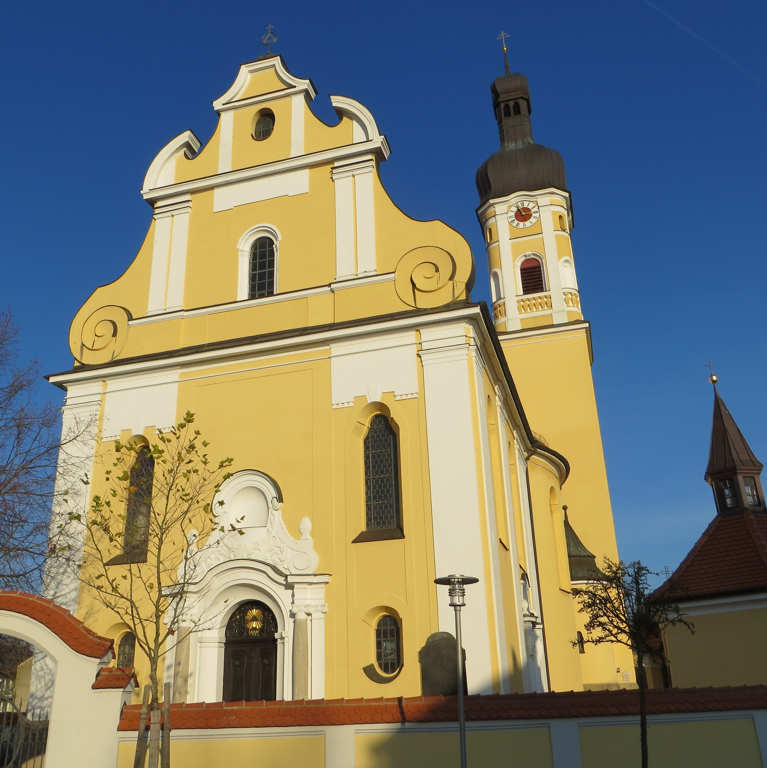 St. Georg - Obertraubling